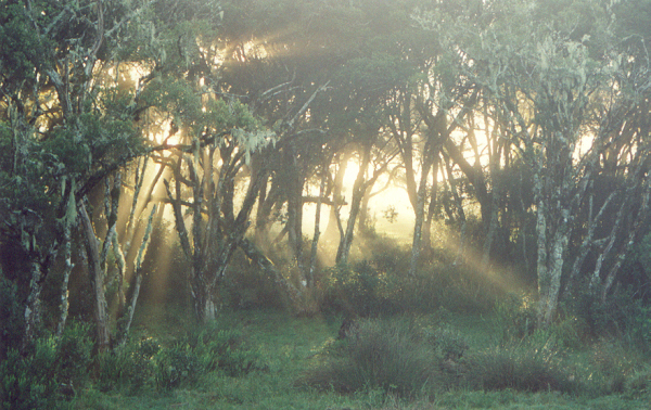 Mata nebular encontrada no Cânion do Itaimbezinho, Parque Nacional de Aparados da Serra, Rio Grande do Sul - Brasil.